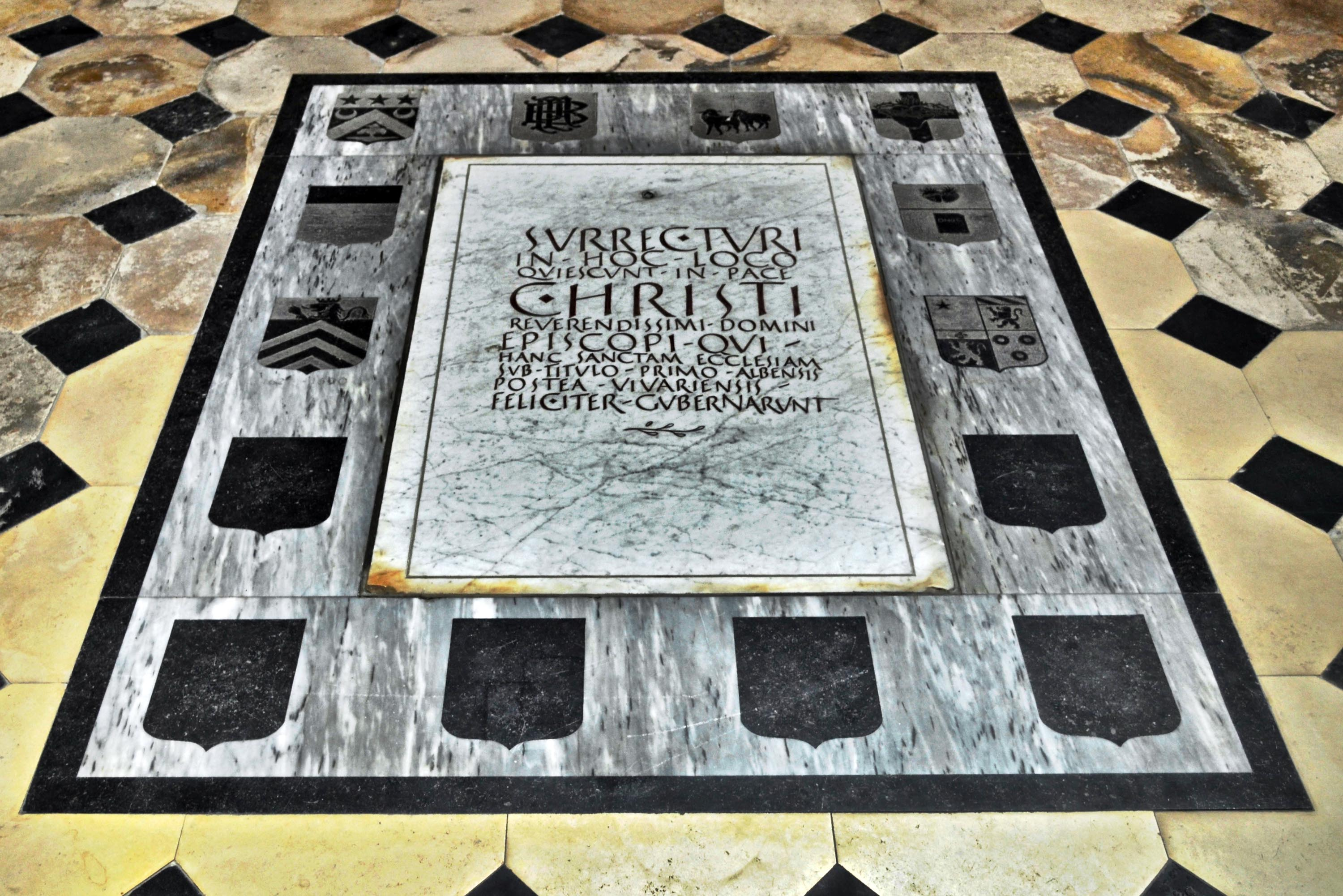 Cathédrale Saint-Vincent de Viviers (Ardèche), dalle funéraire des évêques inhumés dans le chœur de la cathédrale.